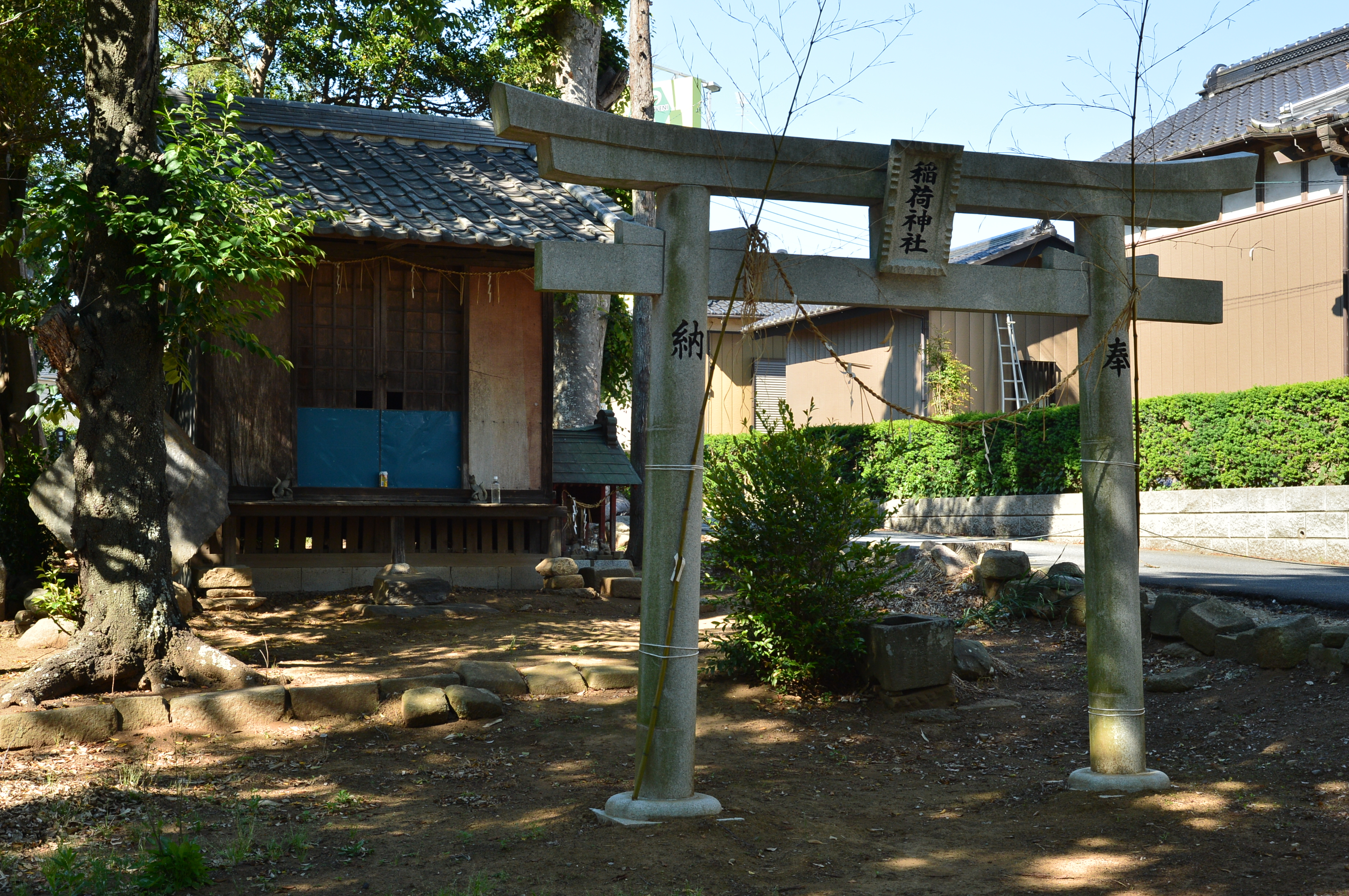 阿彌神社境内にある稲荷神社（稲敷郡阿見町中郷）